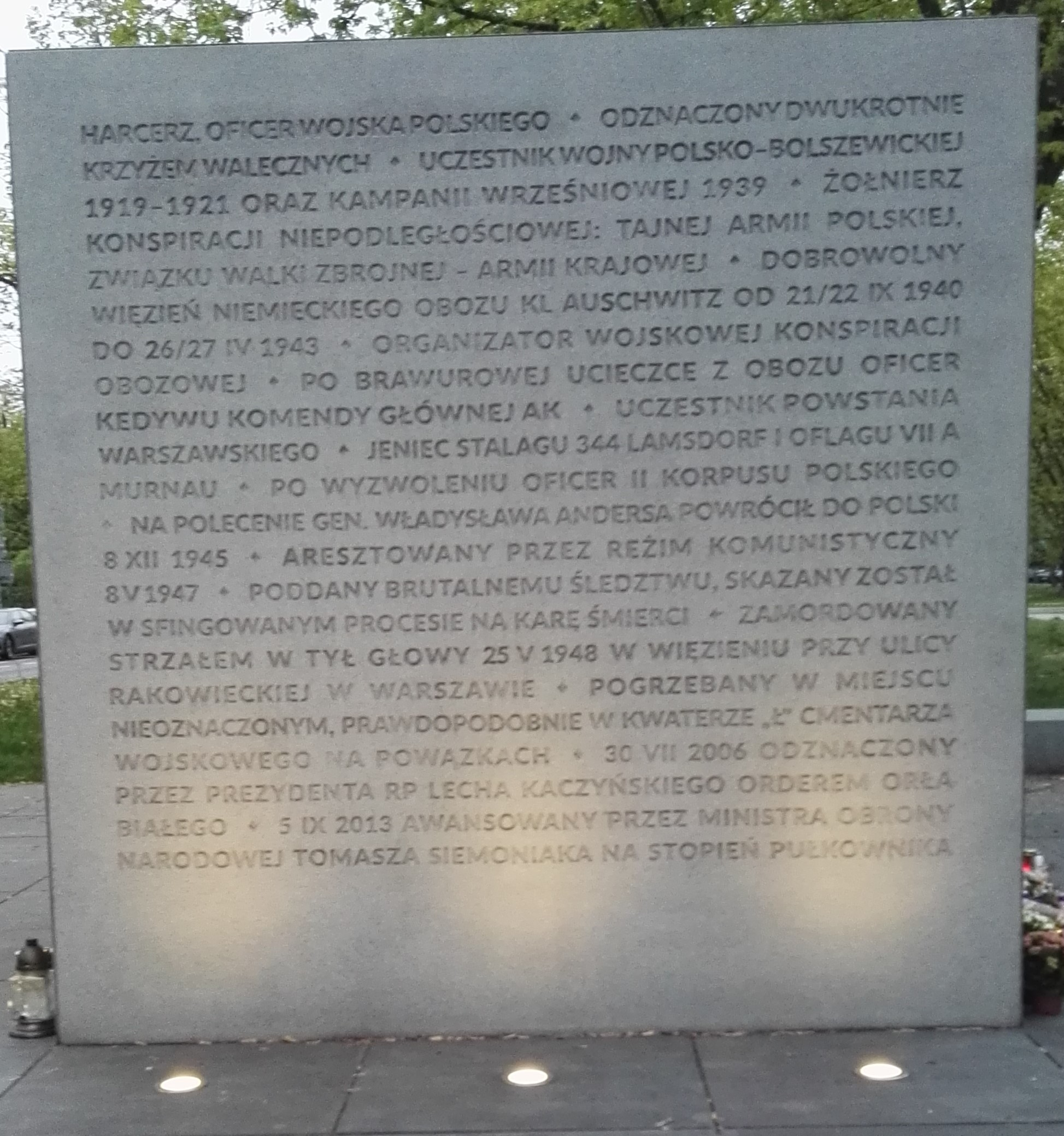 Pomnik Witolda Pileckiego w Warszawie 13.05.2020 w rocznicę urodzin